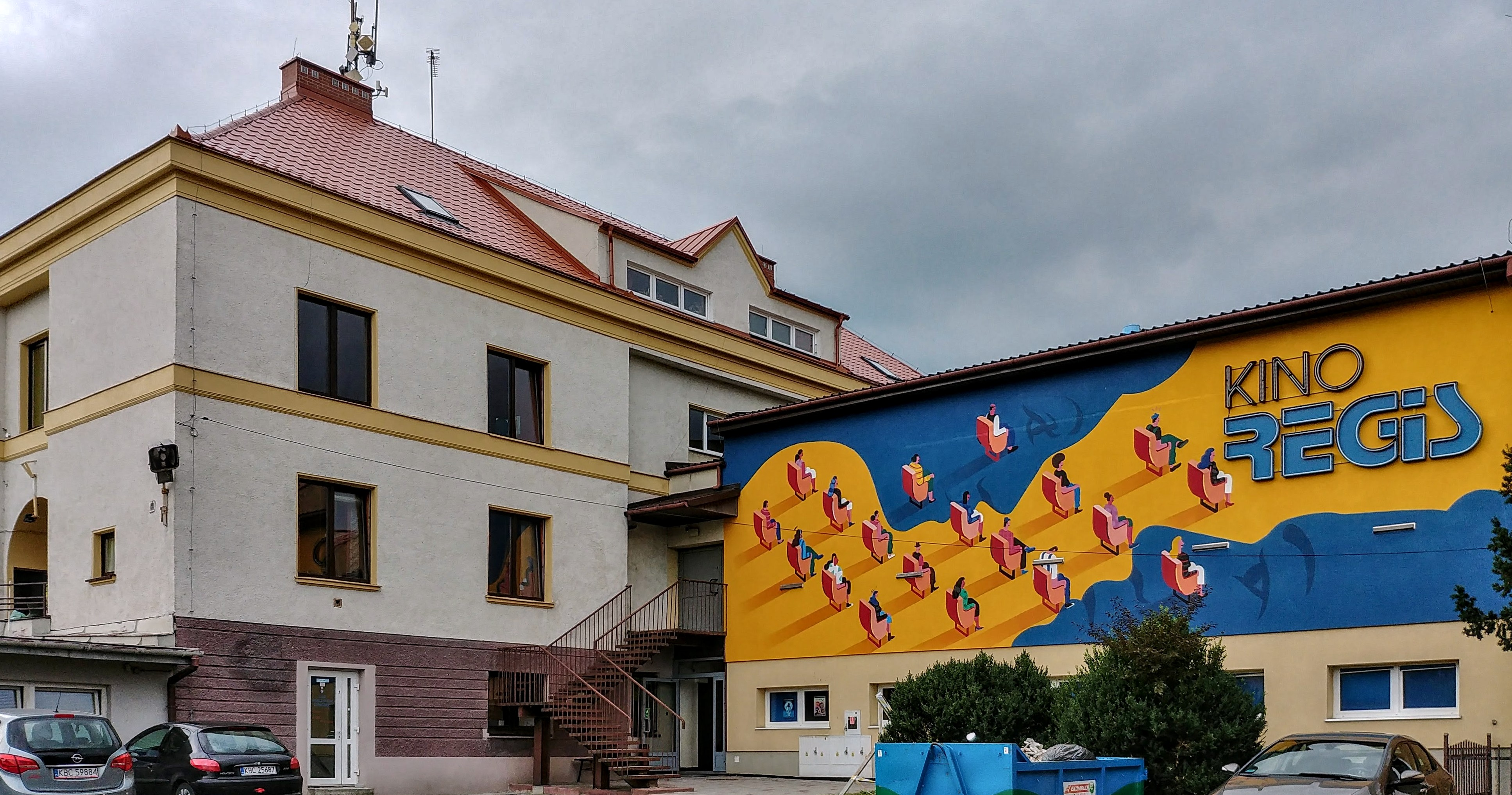 Kino Regis w Bochni.